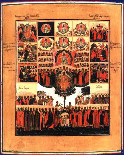 Шестоднев. 19 век. Палех Дерево, левкас, темпера. 44х37 см. В иконе оригинально изображение Субботы Всех святых, занимающее среднюю и нижнюю часть композиции. Над святыми, стоящими внизу, представлено грехопадение Адама и Евы, со сценами изгнания из рая. Над райским древом - Христос во славе, выше - Господь Саваоф в силах, им предстоят ангелы и сонмы святых. Выше - шесть дней Творения в сокращенном изображении. Икона является памятником палехской иконописи середины XIX века. Имеет художественное значение, представляет музейную ценность